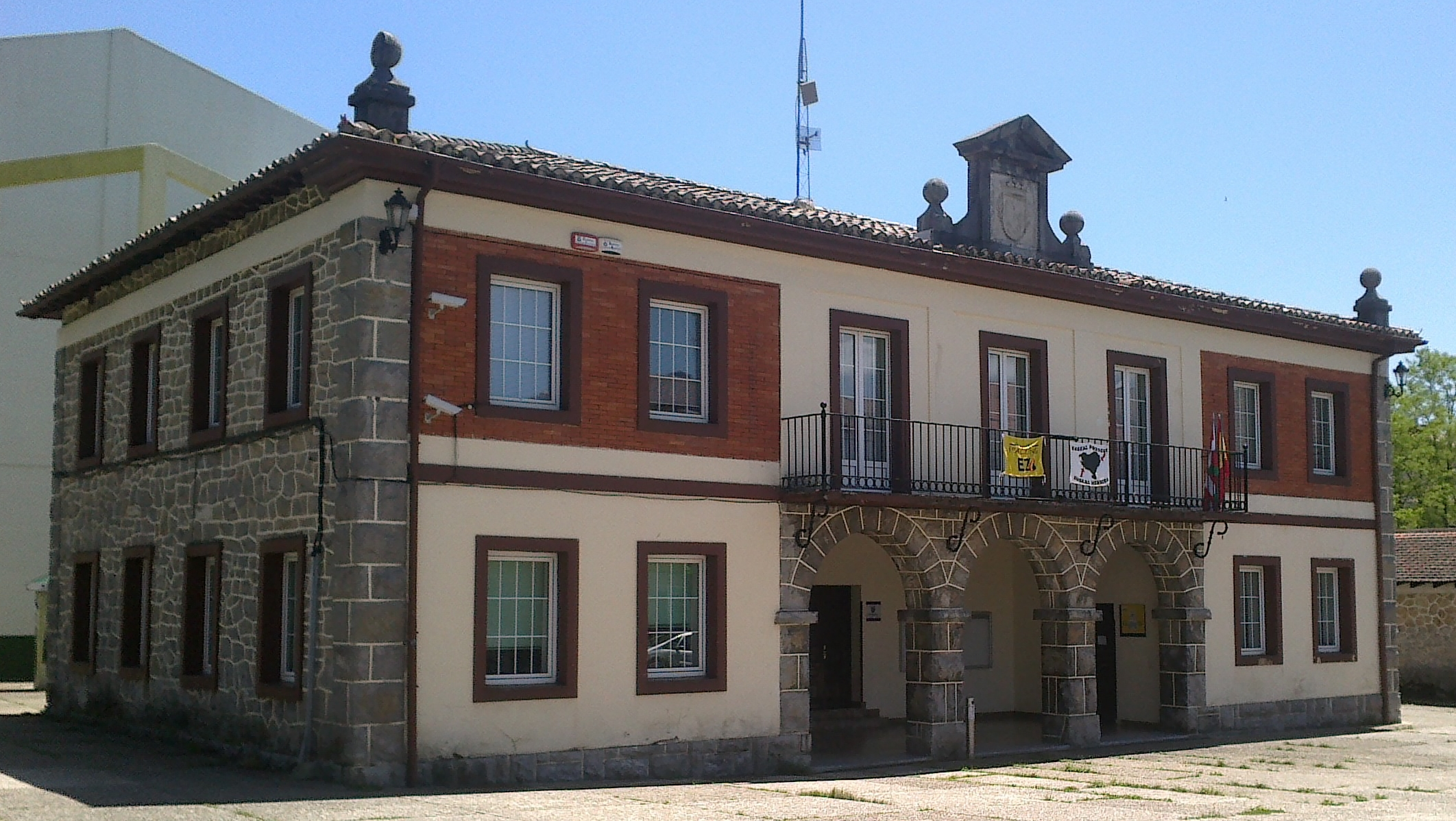 Urkabustaizko udaletxea